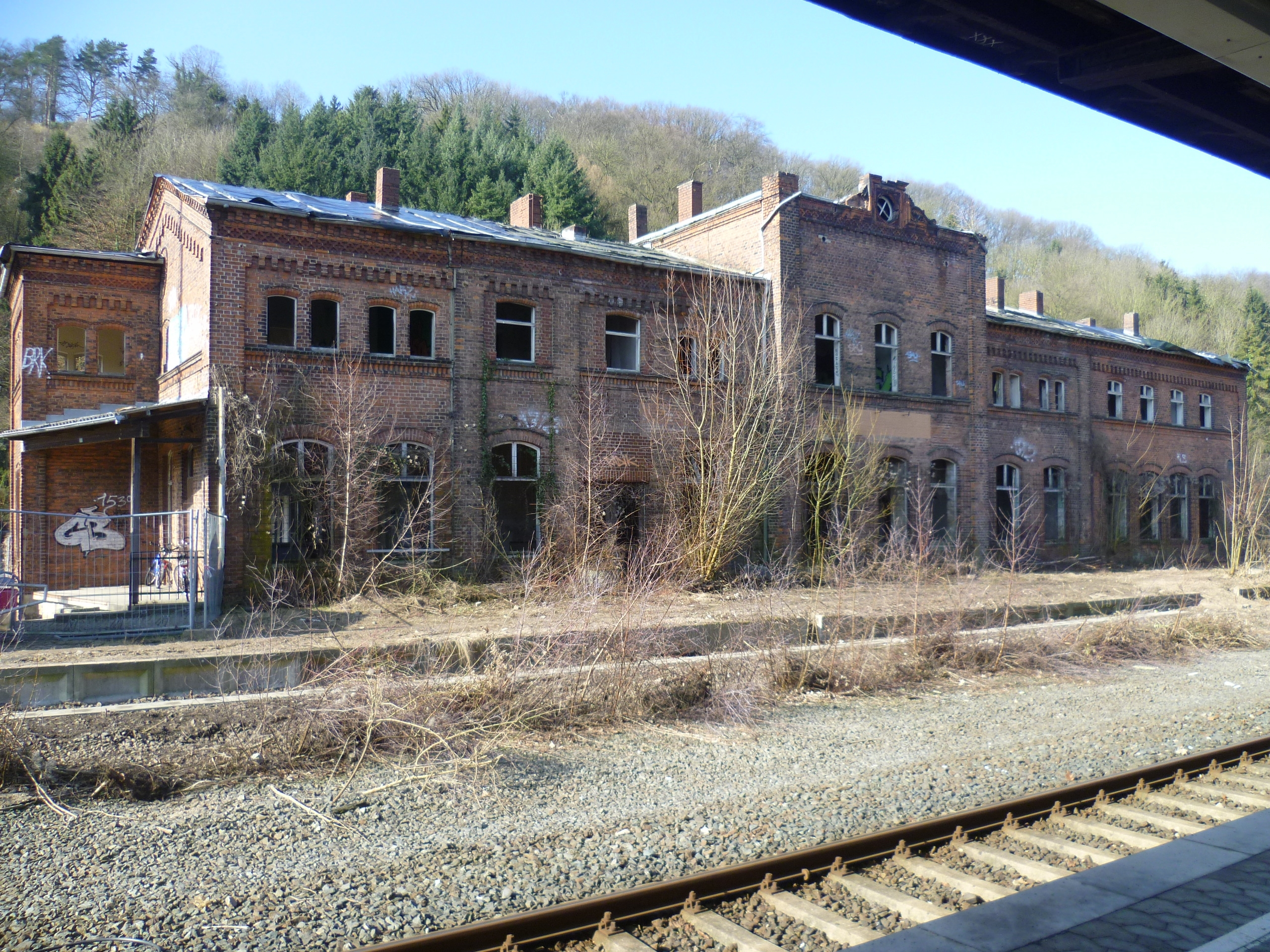 Bahnhof Vlotho, Blick vom Inselbahnsteig auf das alte Gebäude